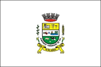 Bandeira Oficial de Almirante Tamandaré do Sul - RS, Brasil.